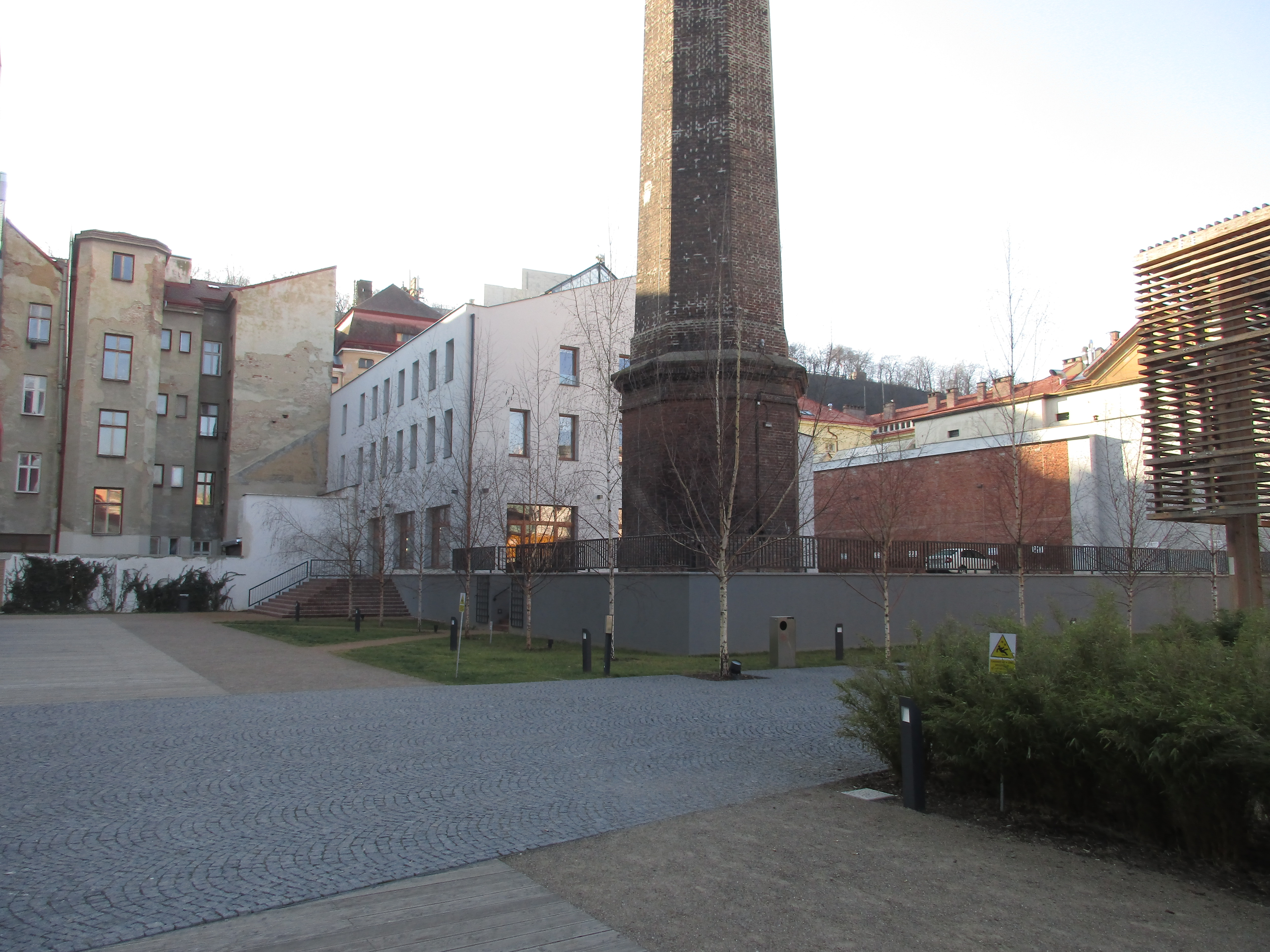 Praha 8-Karlín, Pernerova 378/31. Hala a komín zaniklé karlínské elektrárny.